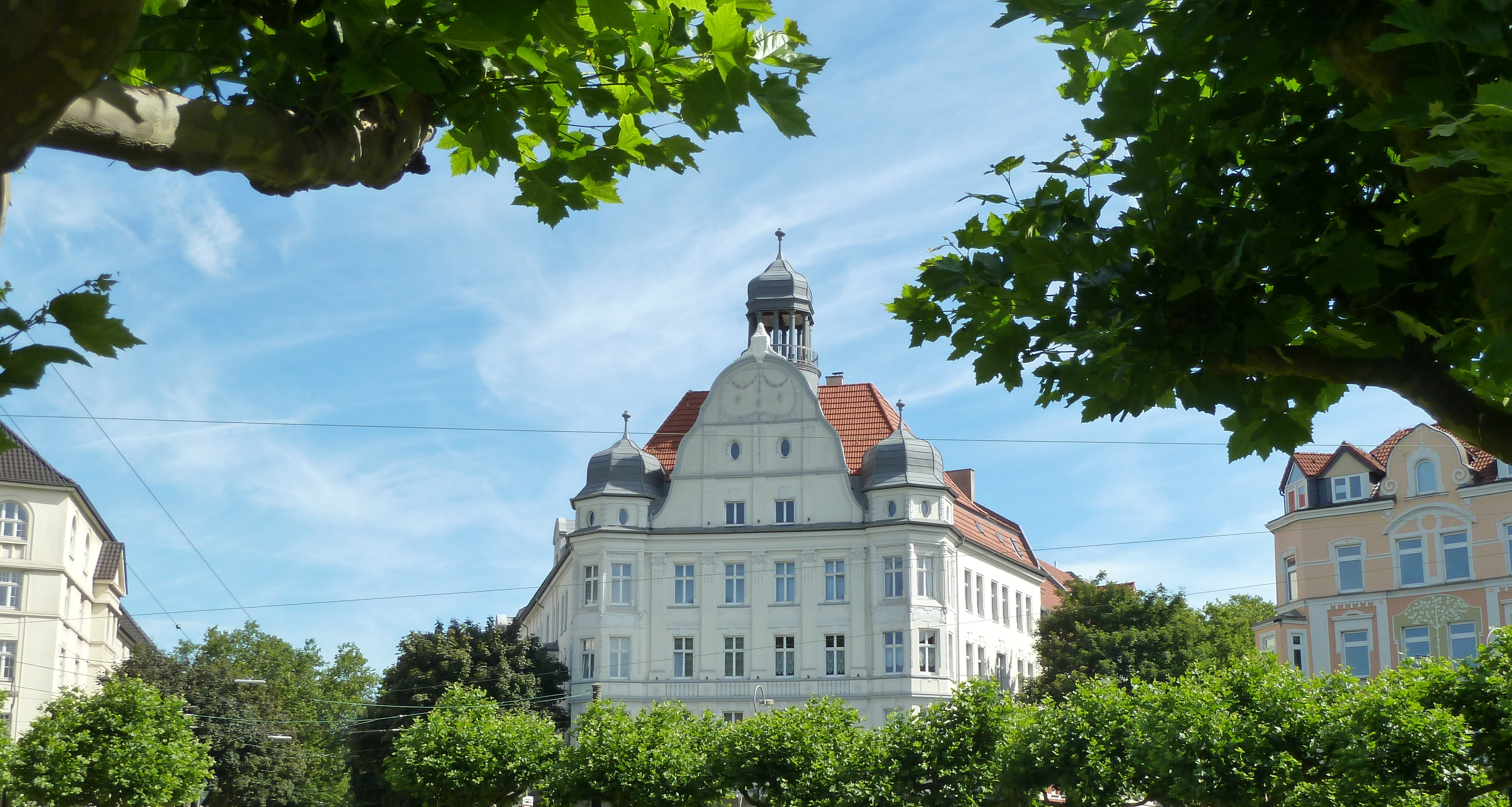 Borsigplatz Concordia Hauptgebäude